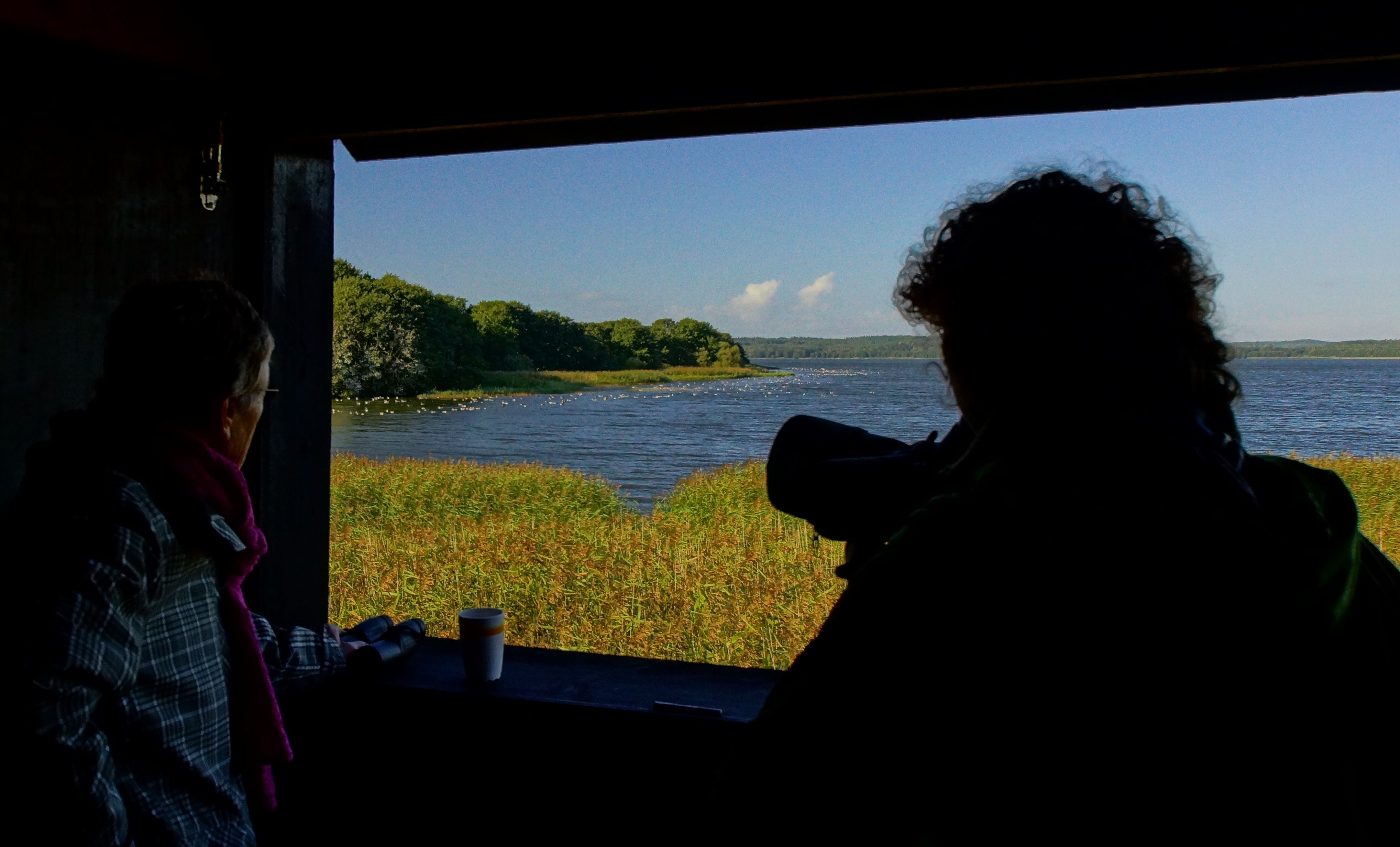 Fra Stubbe Sø's Fugletårn, 25.09.15